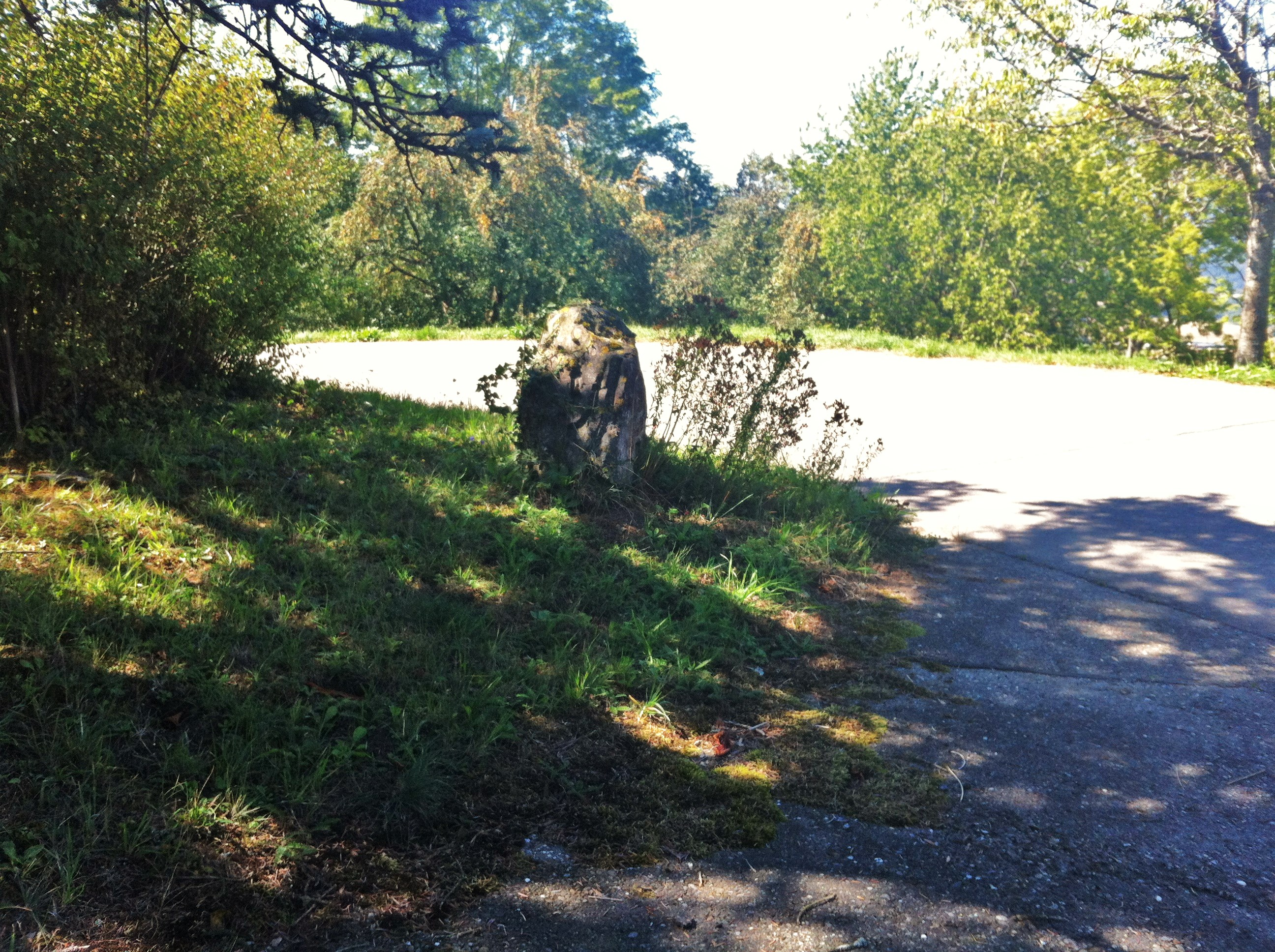 KL Reutehöfe in der Gemeinde Klettgau im Landkreis Waldshut in Baden-Württemberg. Kleine Steinsäule (Monolith) an Wegekreuzung von den Höfen vorbei am Birnberg zum Kalten Wangen.